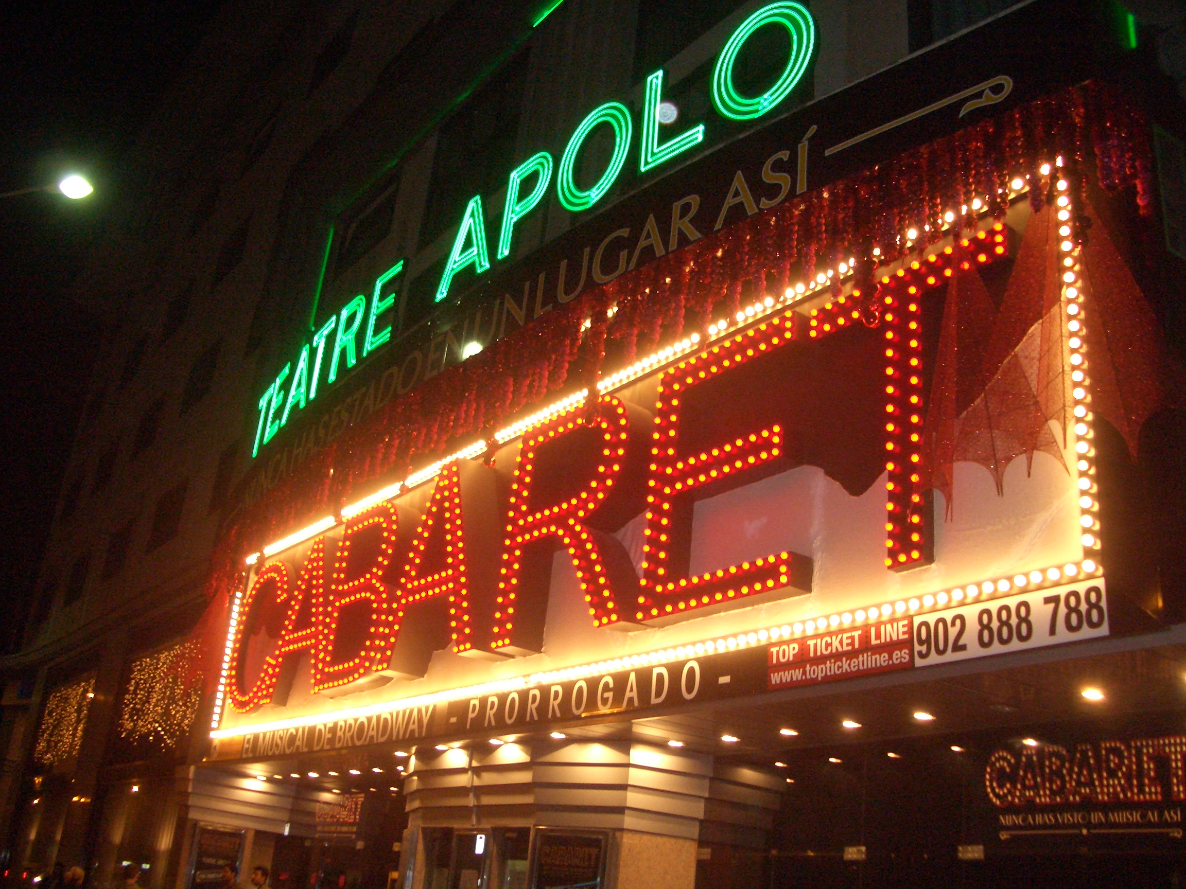 Teatro Apolo Barcelona,España.